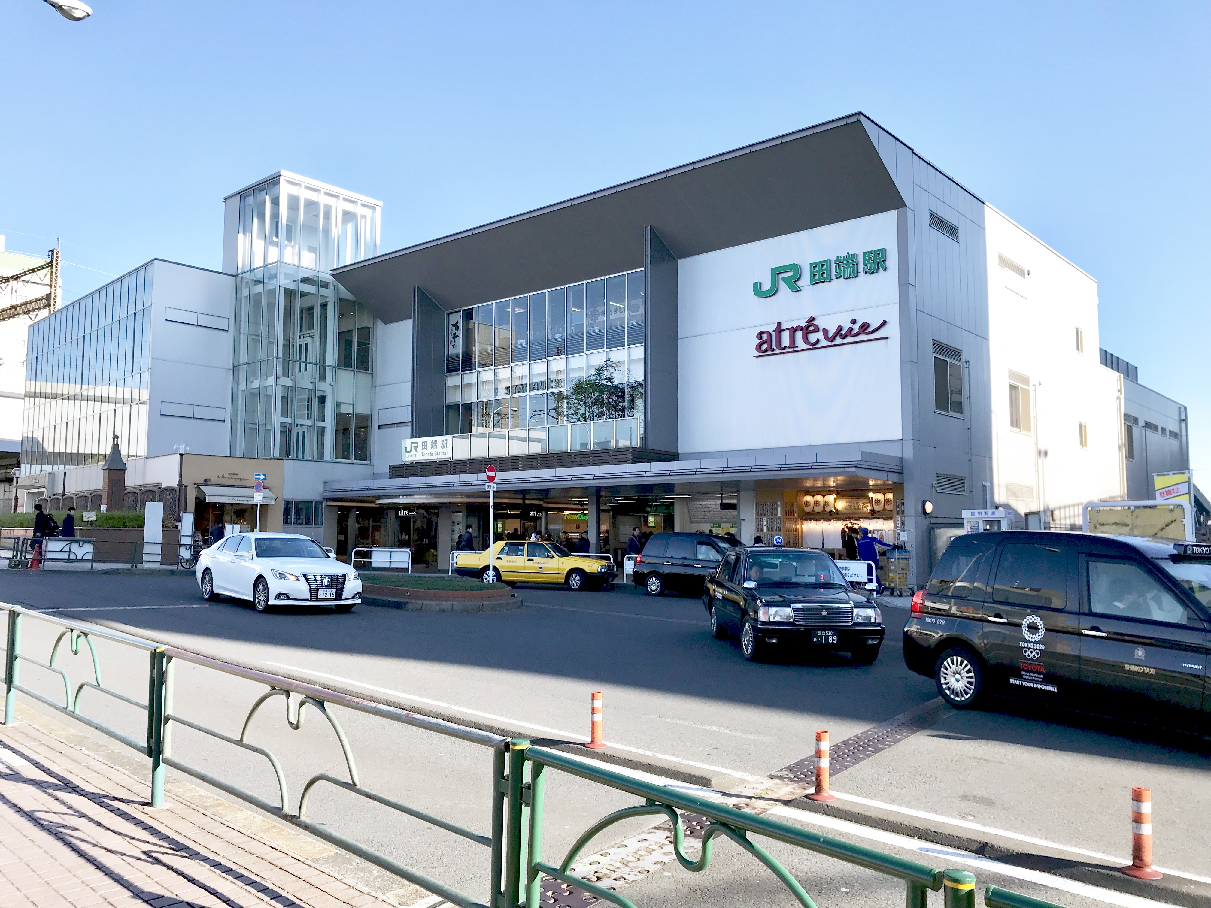 JR東日本山手線・京浜東北線田端駅北口駅舎